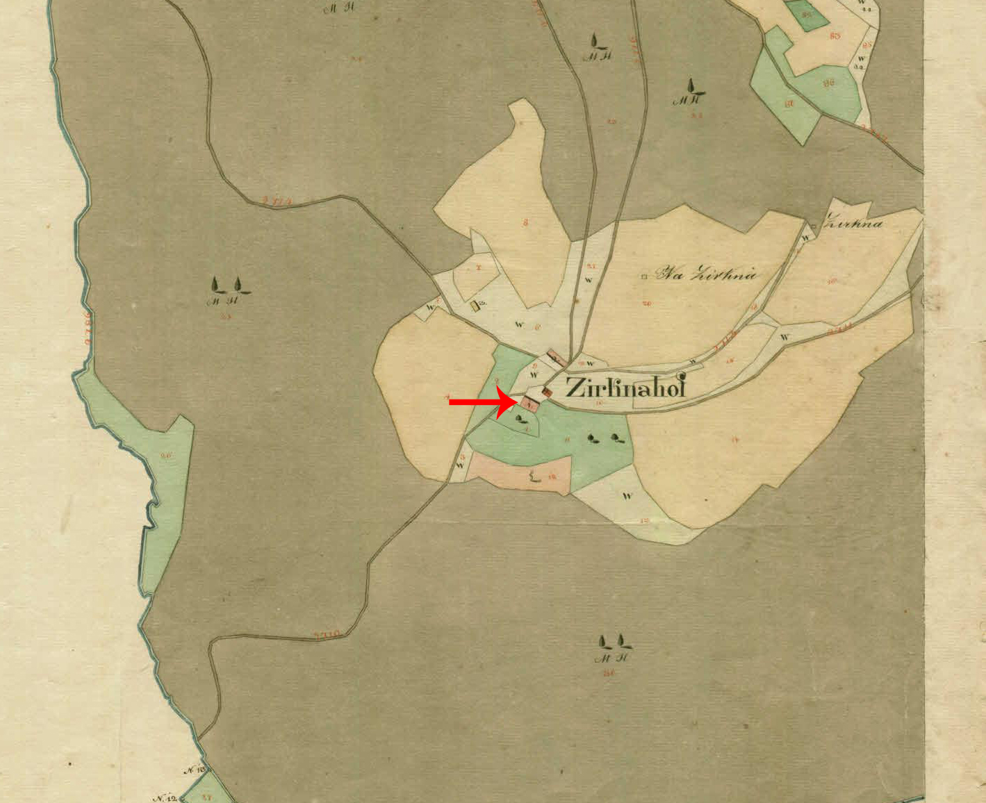 Franciscejski kataster za Kranjsko, 1823-1869